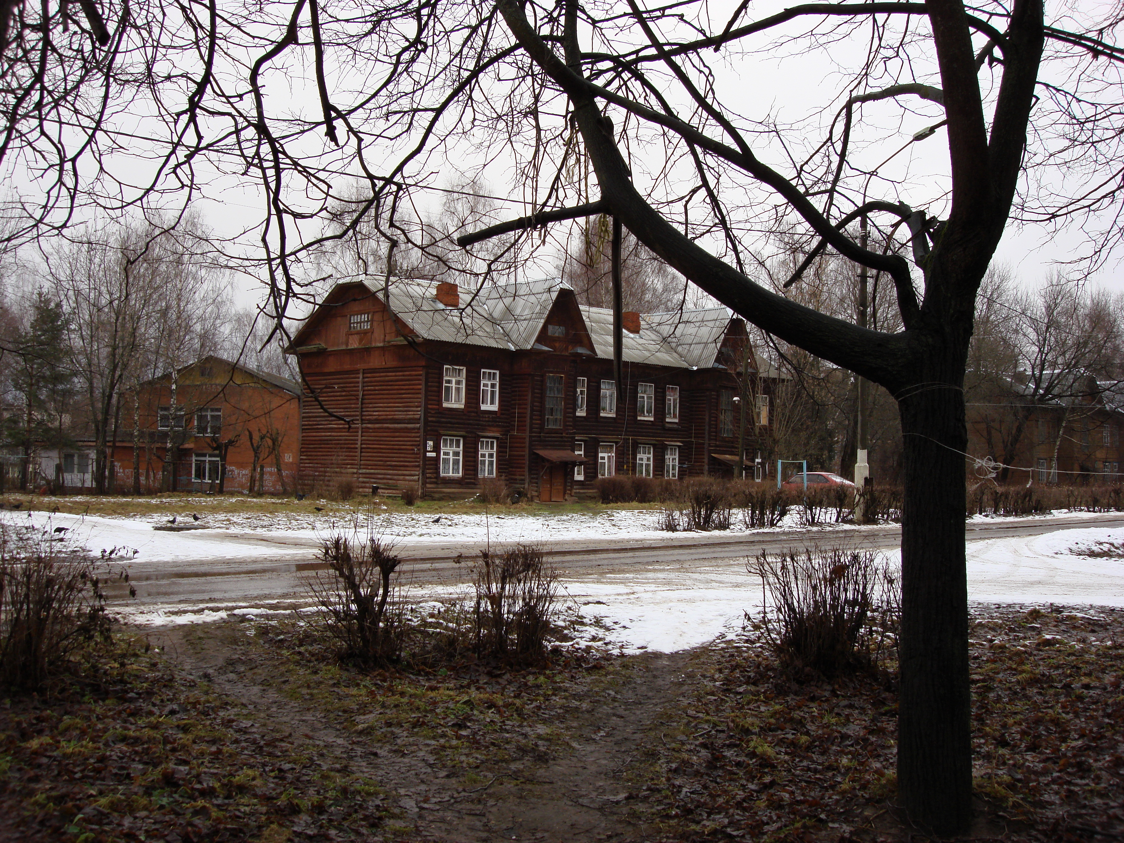 Здание школы ( Высоковск), в которой после войны учился И.В. Новожилов